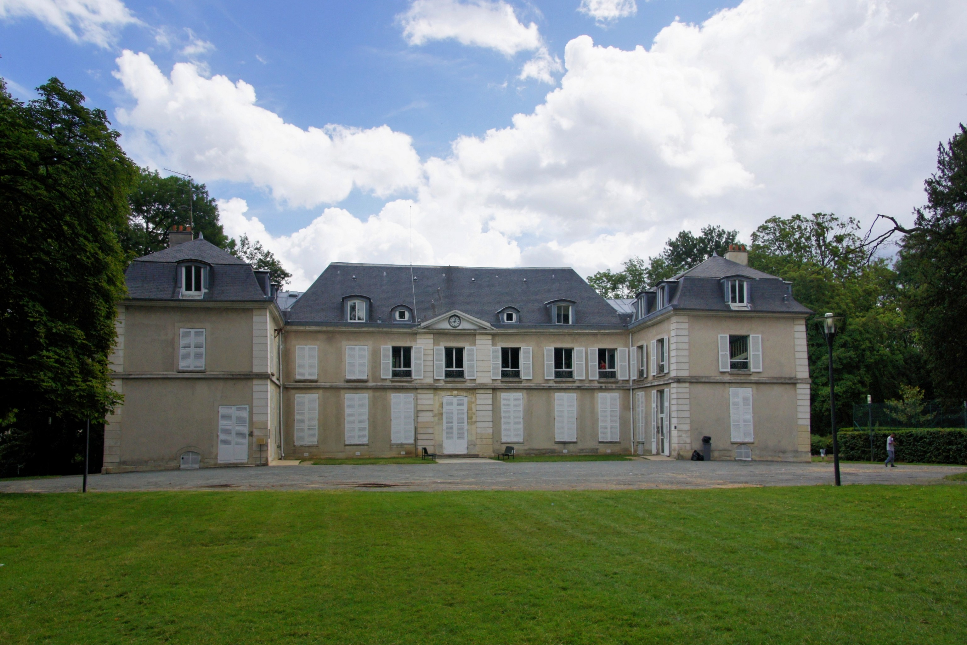 Le château du parc d'Orly (94)